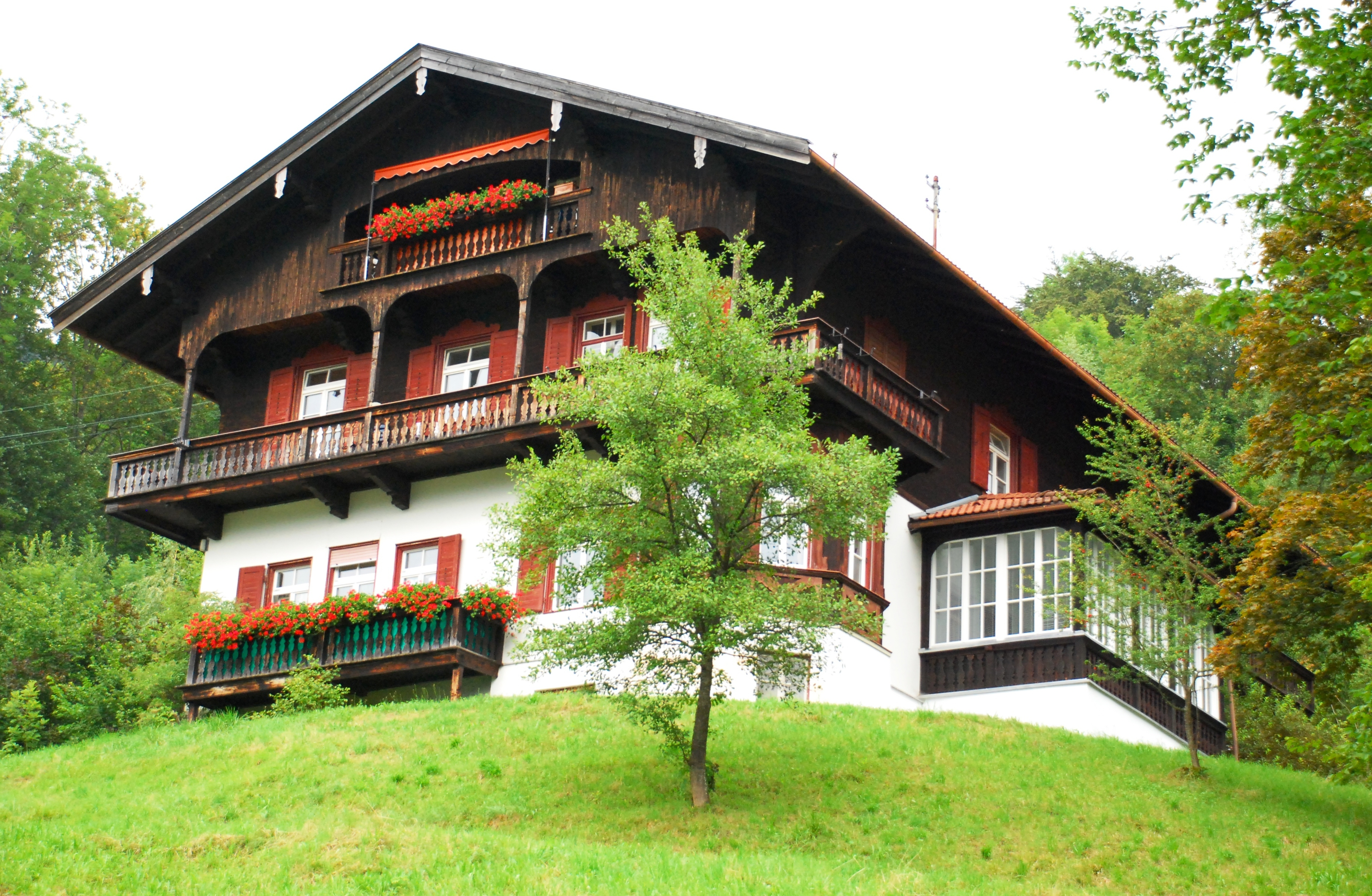 Ehemaliges Wohnhaus der deutschen Schriftstellerin Hedwig Courths-Mahler (1867-1950) in der Schwaighofstraße 47 in Tegernsee, Landkreis Miesbach, Regierungsbezirk Oberbayern, Bayern. Laut Gebäudetafel im Jahr 1900 erbaut, 1933 von Courths-Mahler erworben und bis zu ihrem Tod 1950 von ihr bewohnt. Als Baudenkmal in der Bayerischen Denkmalliste aufgeführt. Foto gemäß den Voraussetzungen zur Panoramafreiheit von öffentlicher Verkehrsfläche aus aufgenommen.